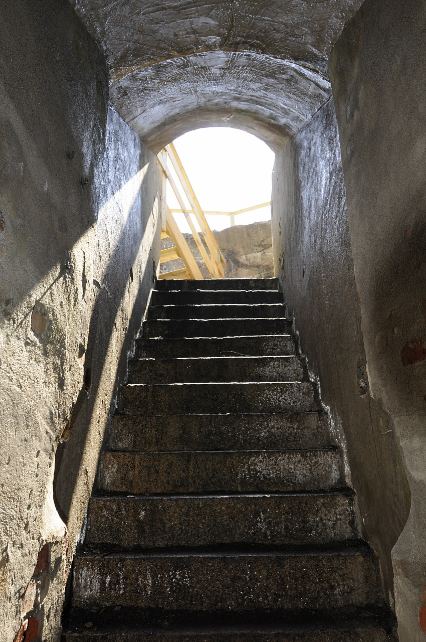 Trapp opp fra bunker med mannskapsrom, til kanonstillingen.